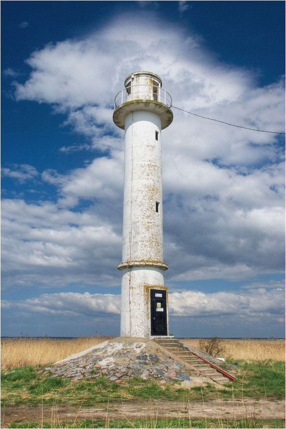 Paralepa alumine tuletorn